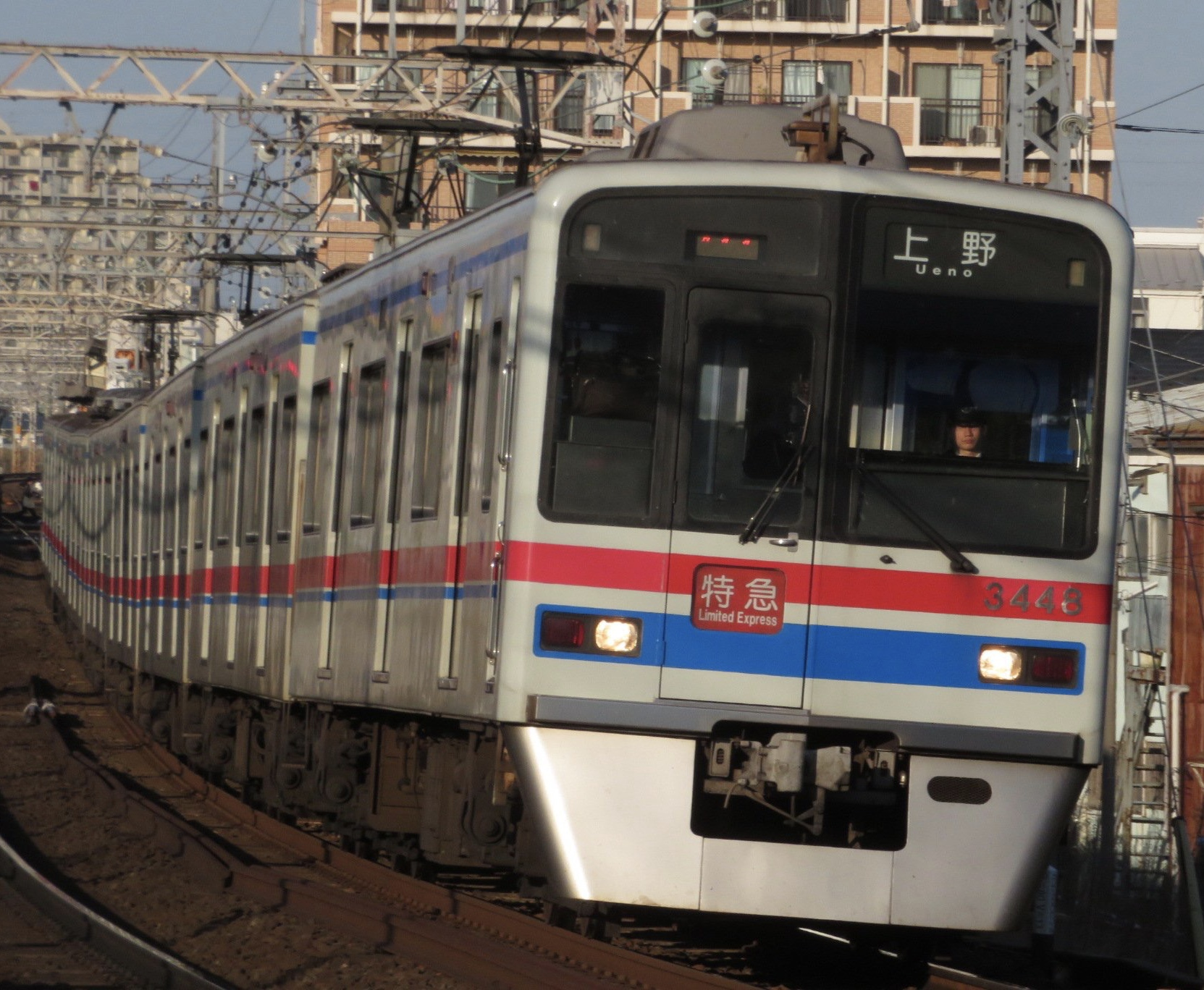 京成3400形3448編成 京成本線大和田〜八千代台